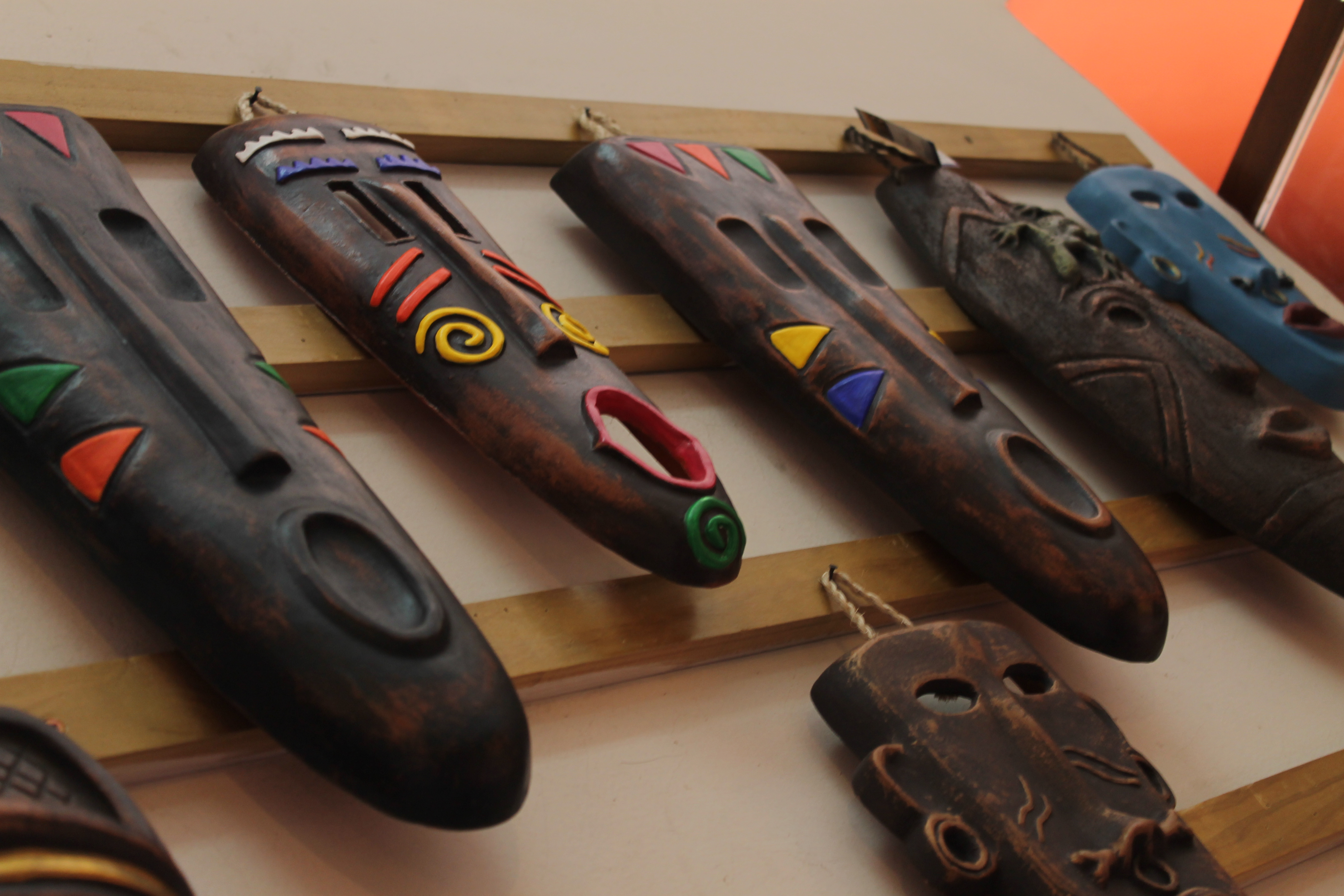 Mascaras de Ilobasco en Barro